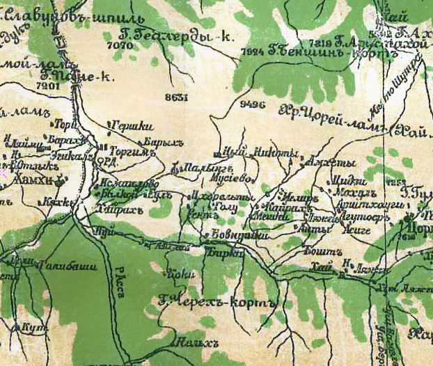 Аул Ний год: 1877